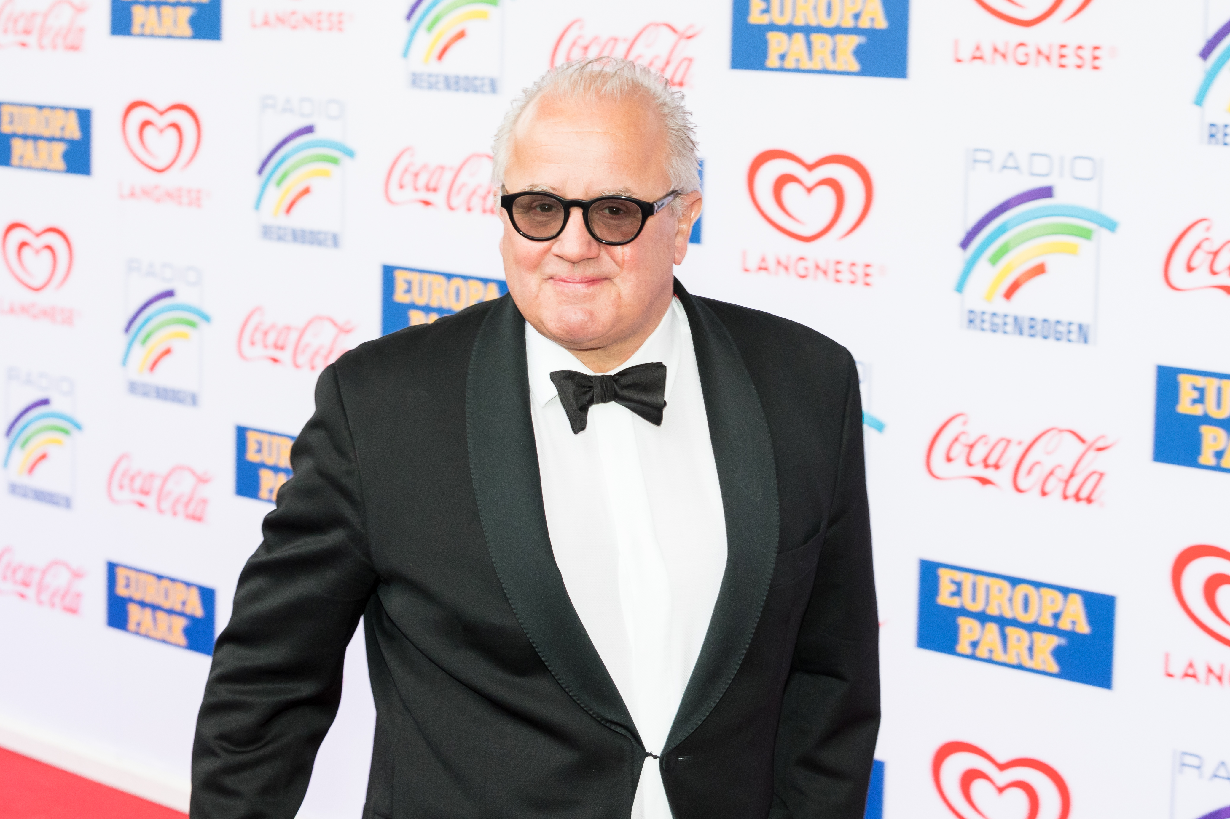 Fritz Keller during Radio Regenbogen Award 2019 at Europapark, Rust, Baden-Württemberg, Germany on 2019-04-12, Photo: Sven Mandel